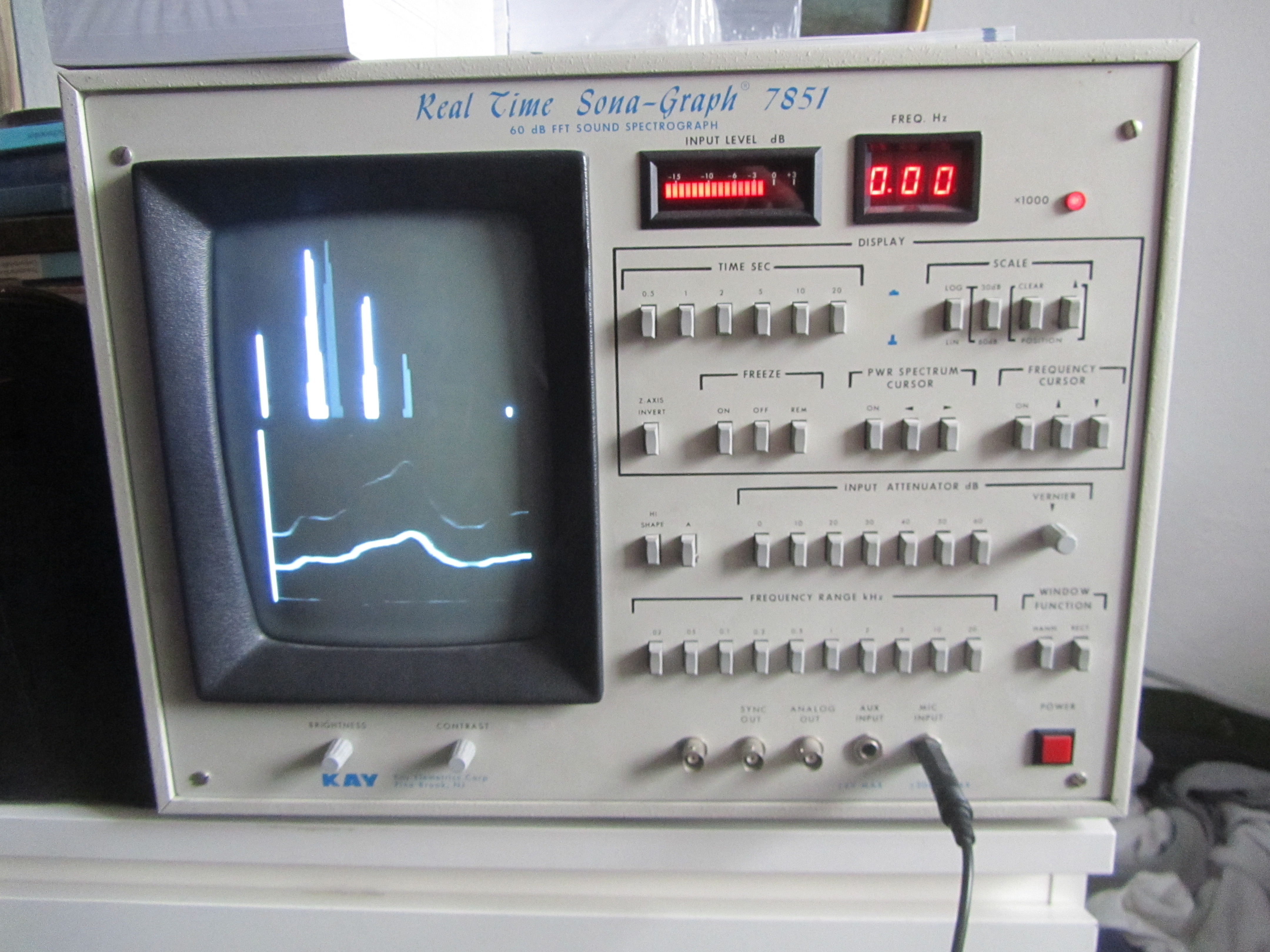 Alter Sonagraph (Real Time Sona-Graph 7851)